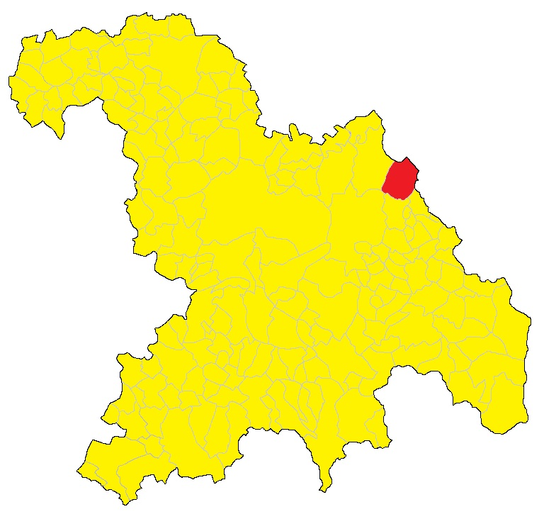 Mappa del comune di Pontecurone (AL)